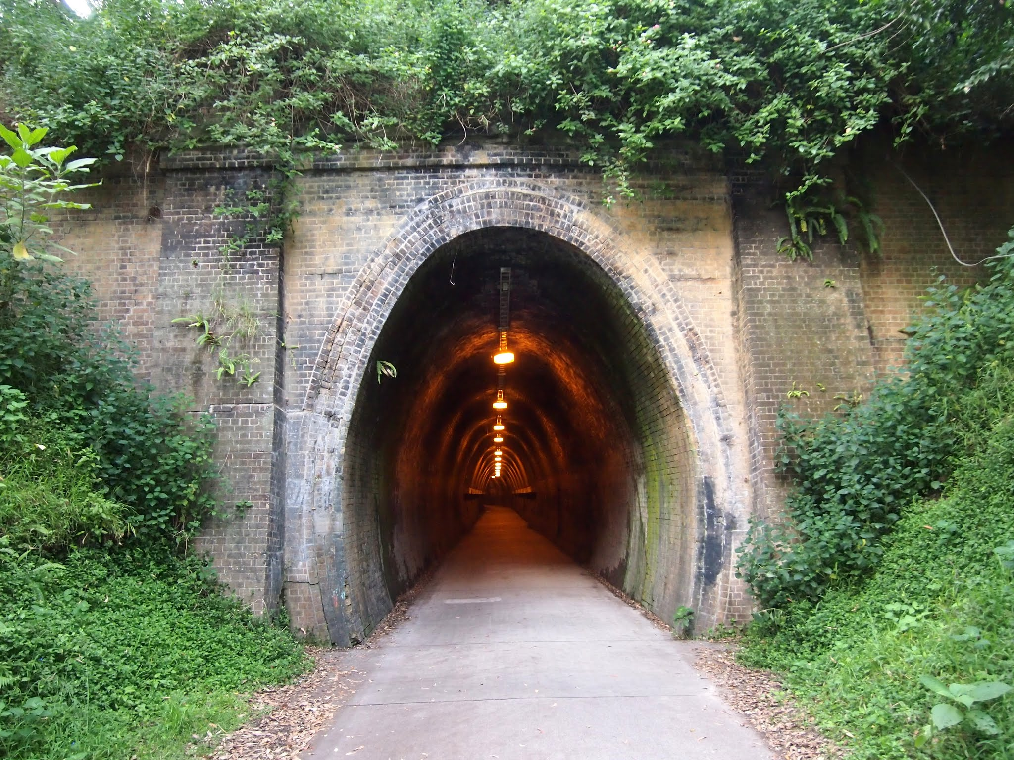 Fernleigh Track